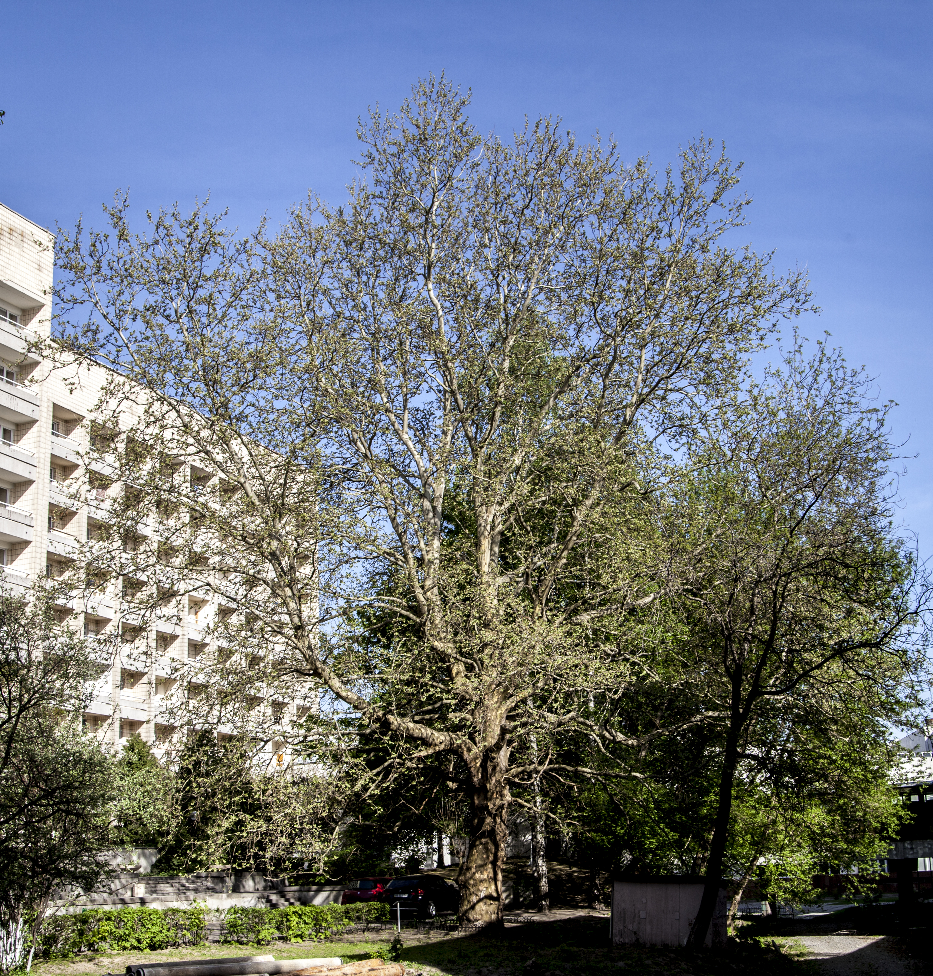 Близько 100 років. Обсяг 3,8 м. Висота 15 м. На цьому місці знаходився Акліматизаційний сад, заснований в 1913 році М. Ф. Кащенком. Платан — єдине дерево, що збереглося після знищення саду в 1970-і роки. Найстаріший та найбільший платан Києва